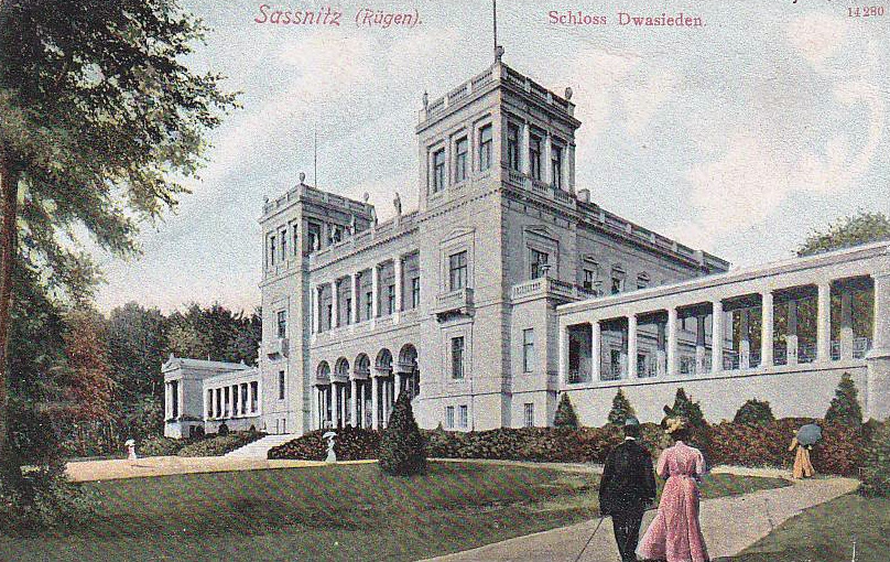 Das historische Schloss Dwasieden im Süden von Sassnitz auf einer Postkarte um 1900. Unmittelbar auf einer Anhöhe an der Ostsee gelegen, besaß das Herrenhaus prächtige Granit- und Marmorfassaden. Es wurde 1948 in einem Akt der Willkür durch die SED-Führung der DDR gesprengt.